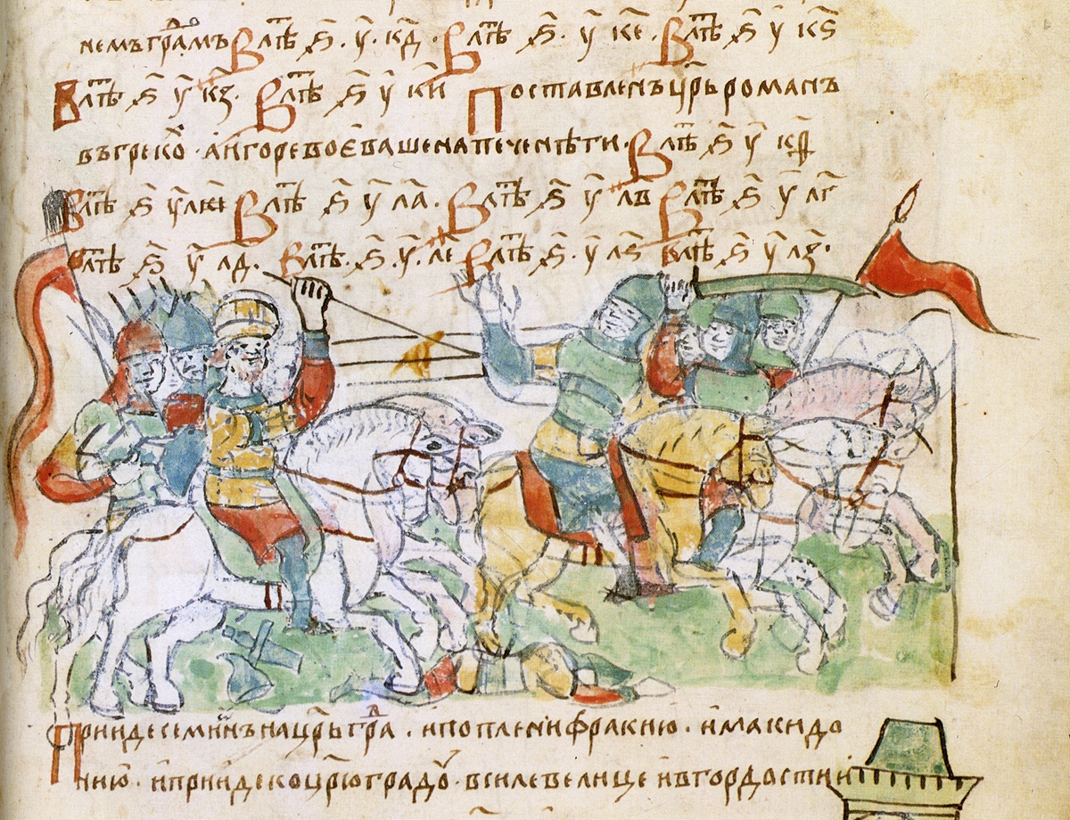 Радзивилловская летопись, л. 21r, детайл Миниатюра: Mиниатюра представляет битва болгарского царя Симеона с византийцами (914) или война Игоря с печенегами Tекст из Радзивиловской летописи: "... а болгаре со грекы ступишася, и пересечени быша грекы. Симеон же приа град Ондрень ... а Игоре воеваше на печенеги ..." (см. также: Хроника Георгия Амартола; Истрин В. М.: Книгы временыя и образныя Георгия Мниха. Хроника Георгия Амартола в древнем славянорусском переводе. Т. 1. Текст, исслед. и словарь. Пг., 1920, стр. 545-546; Иванова Кл., Николова Св.: Тържество на Словото. Златният Век на Българската Книжнина. VI. Летописни творби: Георги Амаратол. Временник) Литература: Кукушкина: Радзивиловская летопись. Текст. Исследование. Описание миниатюр, стр. 310